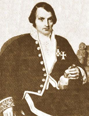 retrato del científico, geólogo Mariano E. de Rivero y Ustariz.